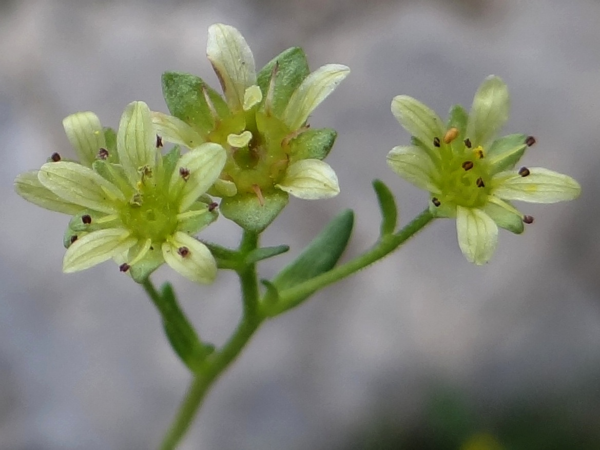 Saxifraga moschata (habitat:West Tatra Mountains)